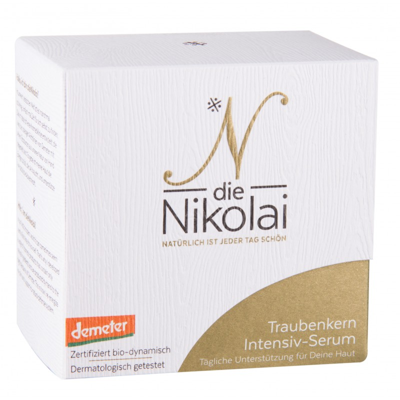 Umverpackung dieNikolai-Serum